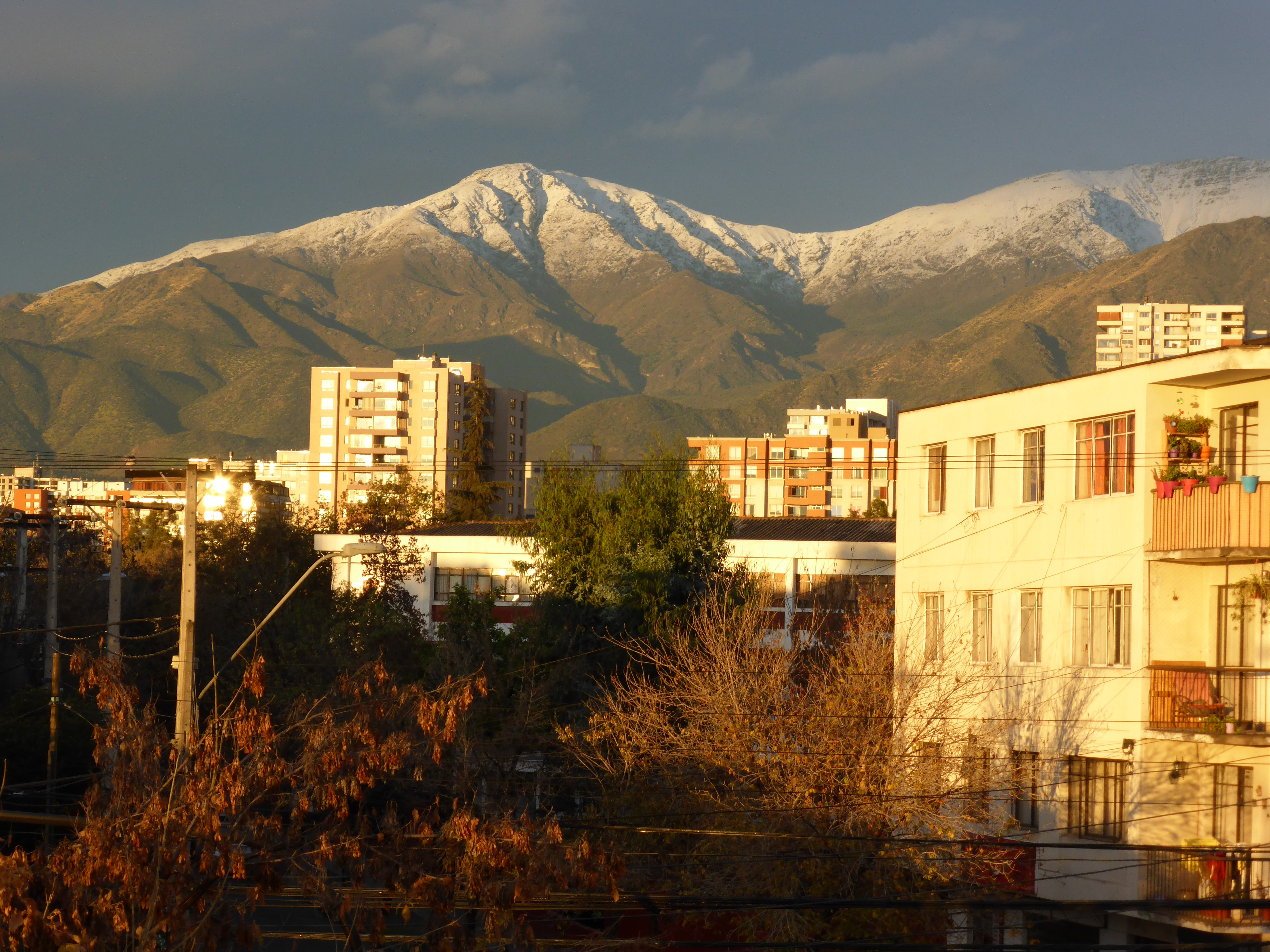 Vista desde un departamento junto a la avenida Pedro de Valdivia, de la comuna de Ñuñoa. Los cerros están nevados.